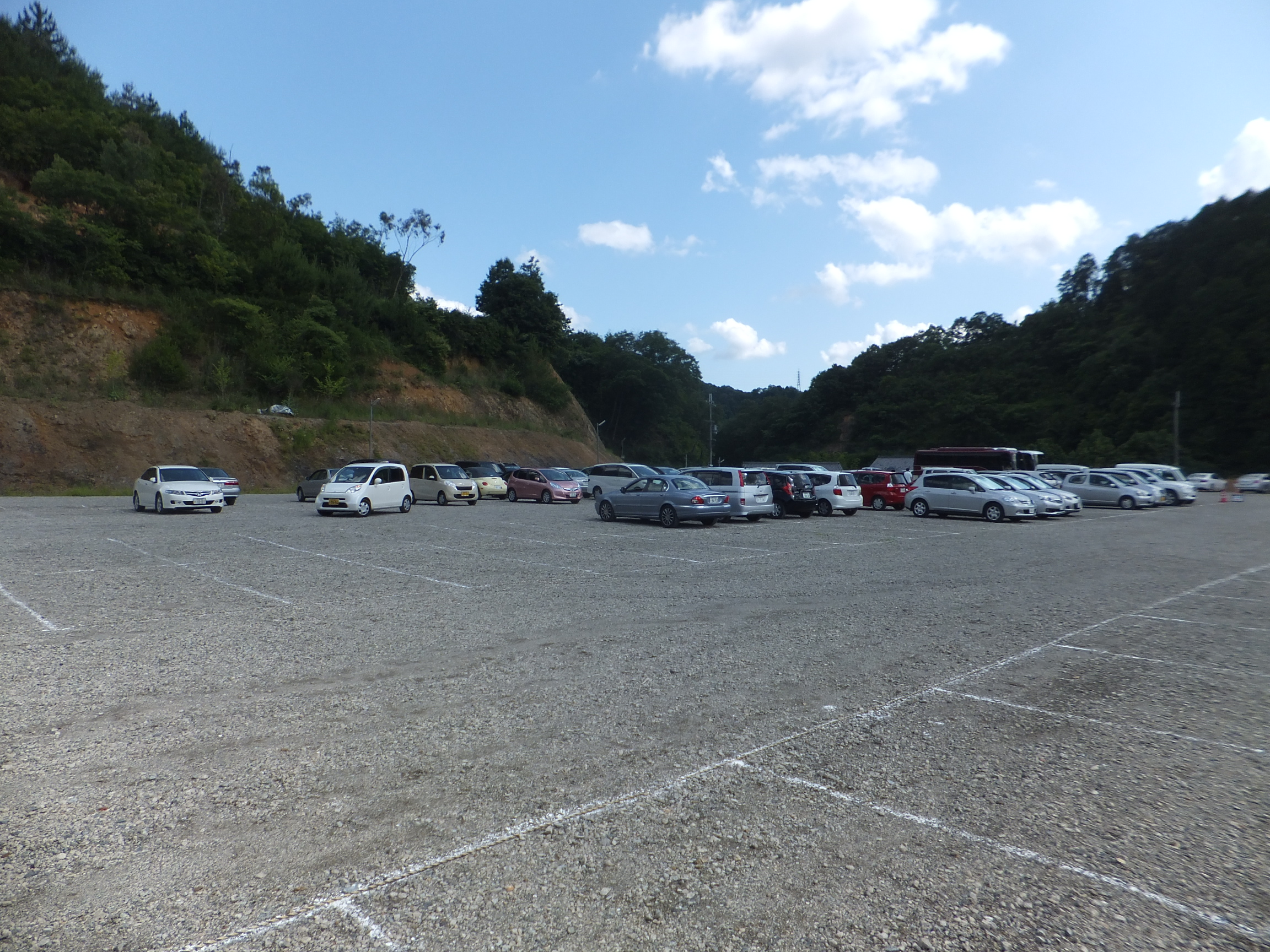 播州山崎花菖蒲園（2013年6月16日）